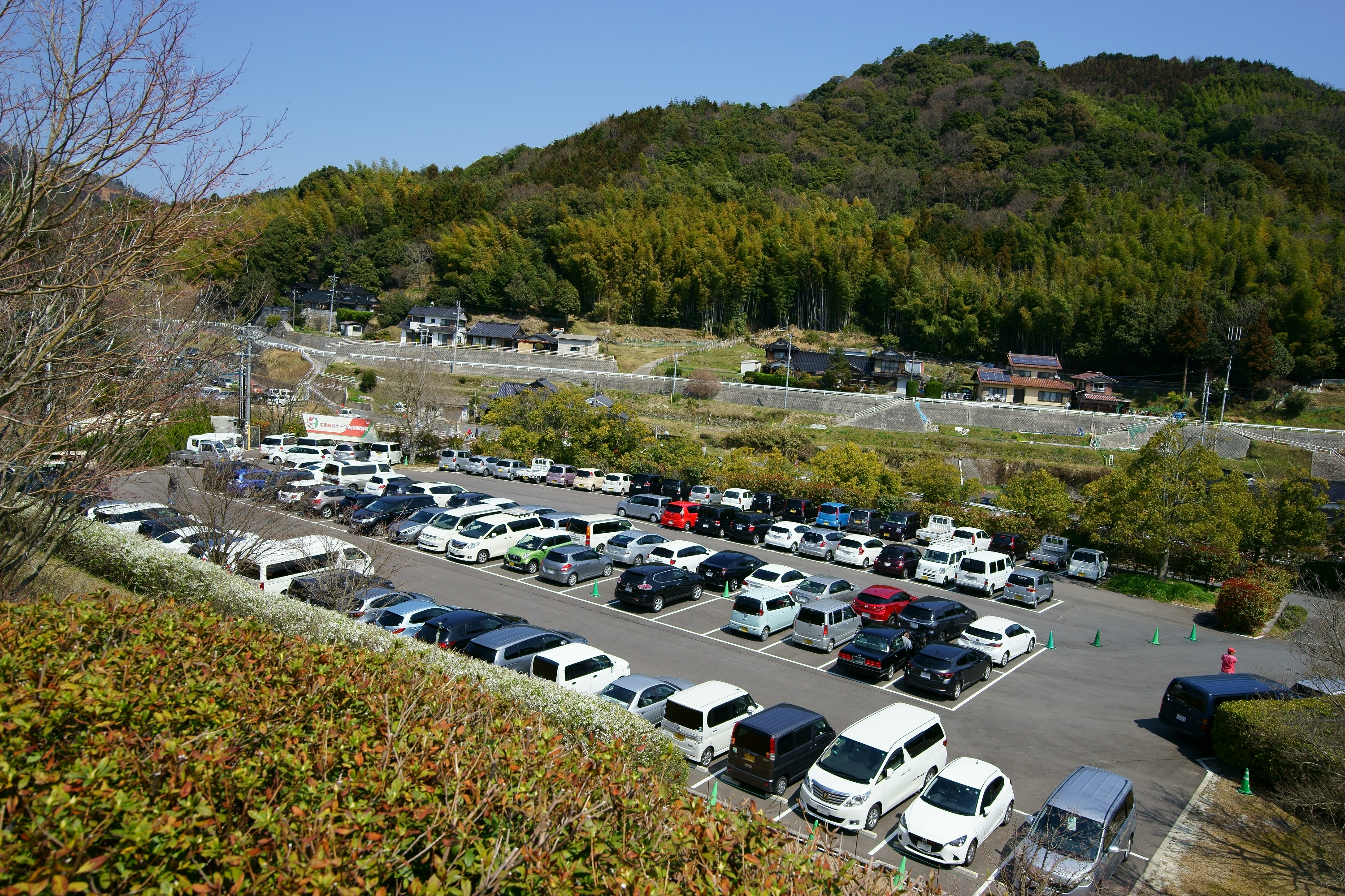 2014年9月23日、本人撮影